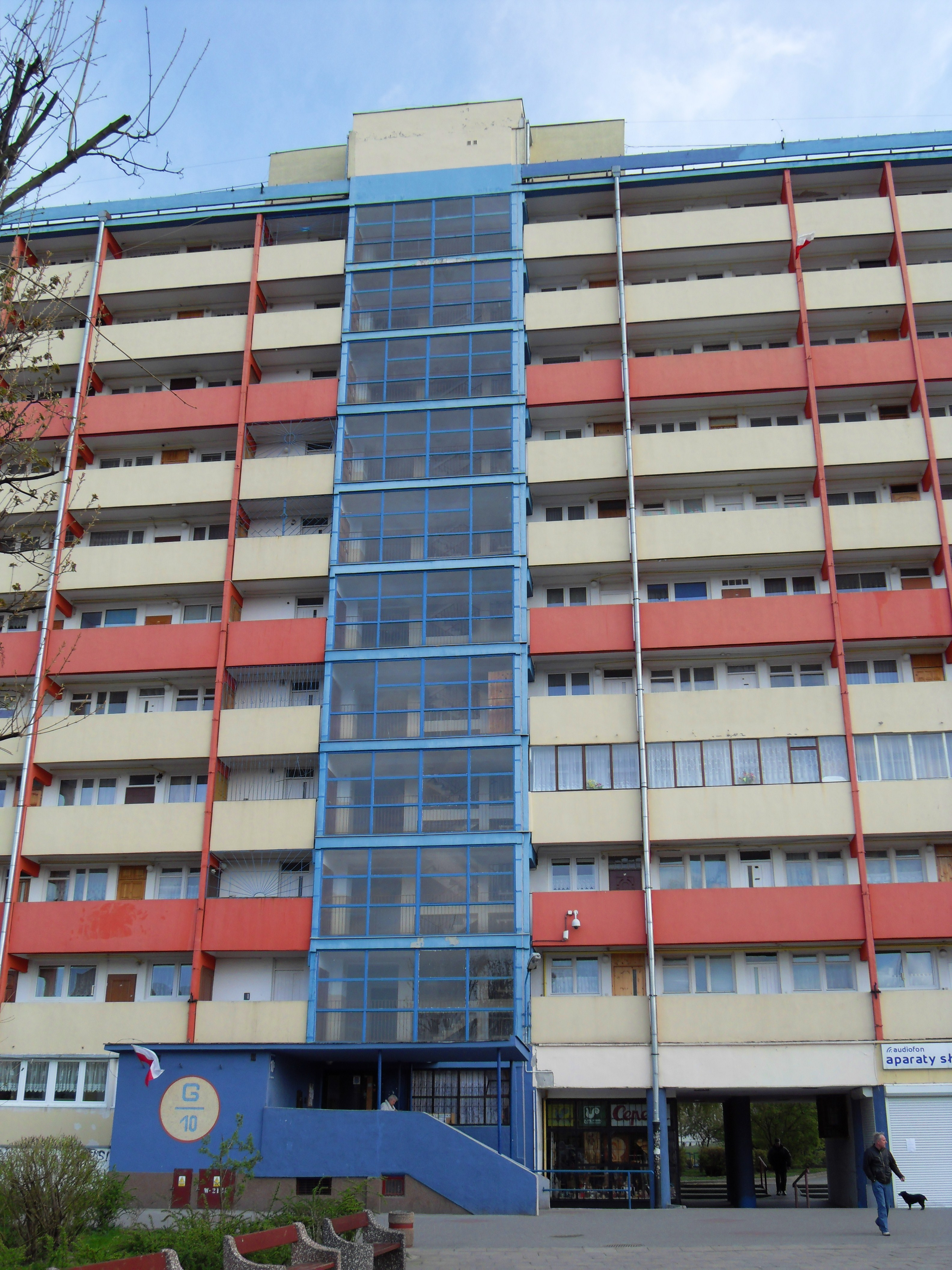 Falowiec, ul. Jagiellońska 10 w Gdańsku Przymorzu. Klatka schodowa.